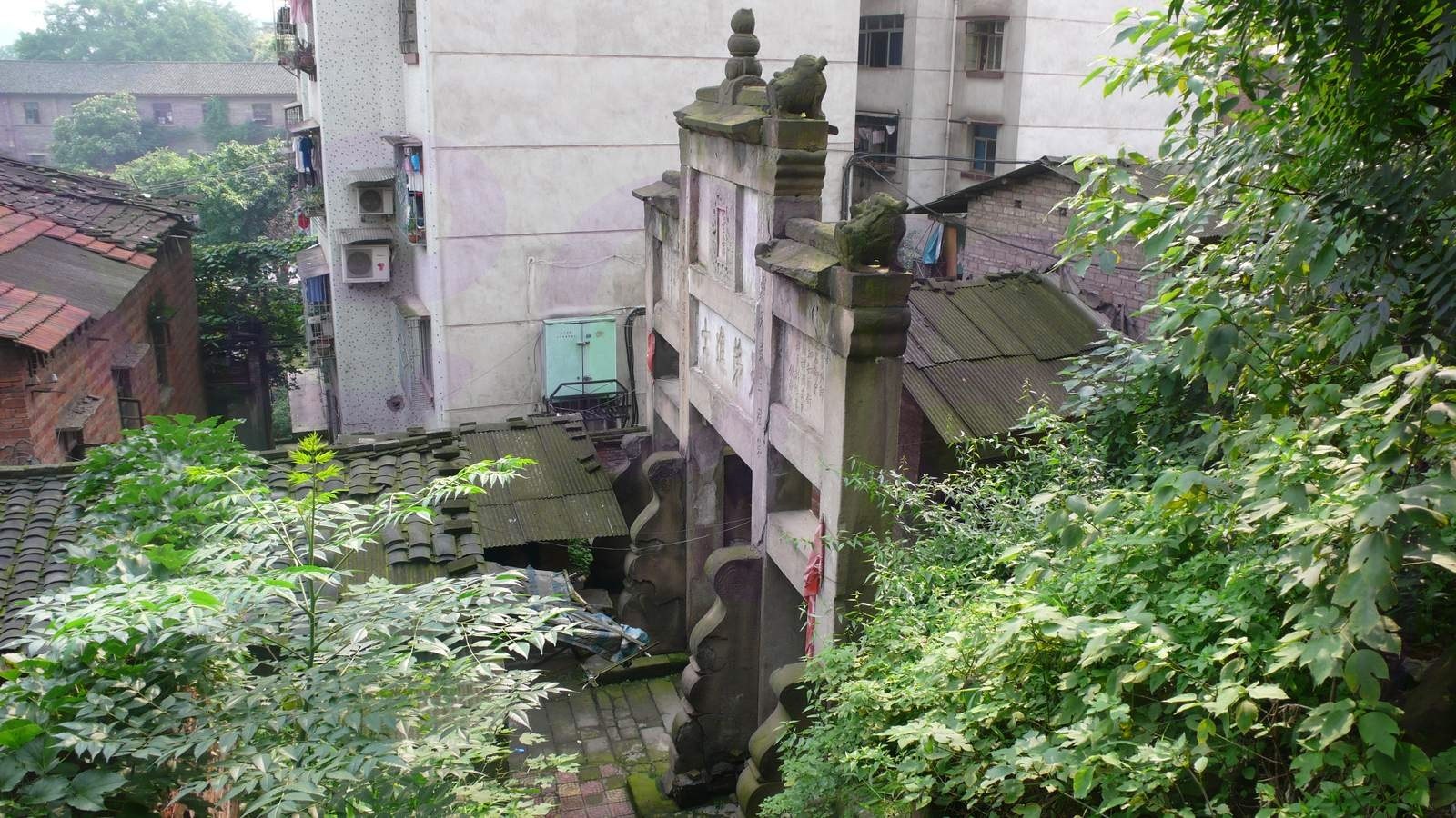 重慶府綦江縣文龍兄弟進士牌坊